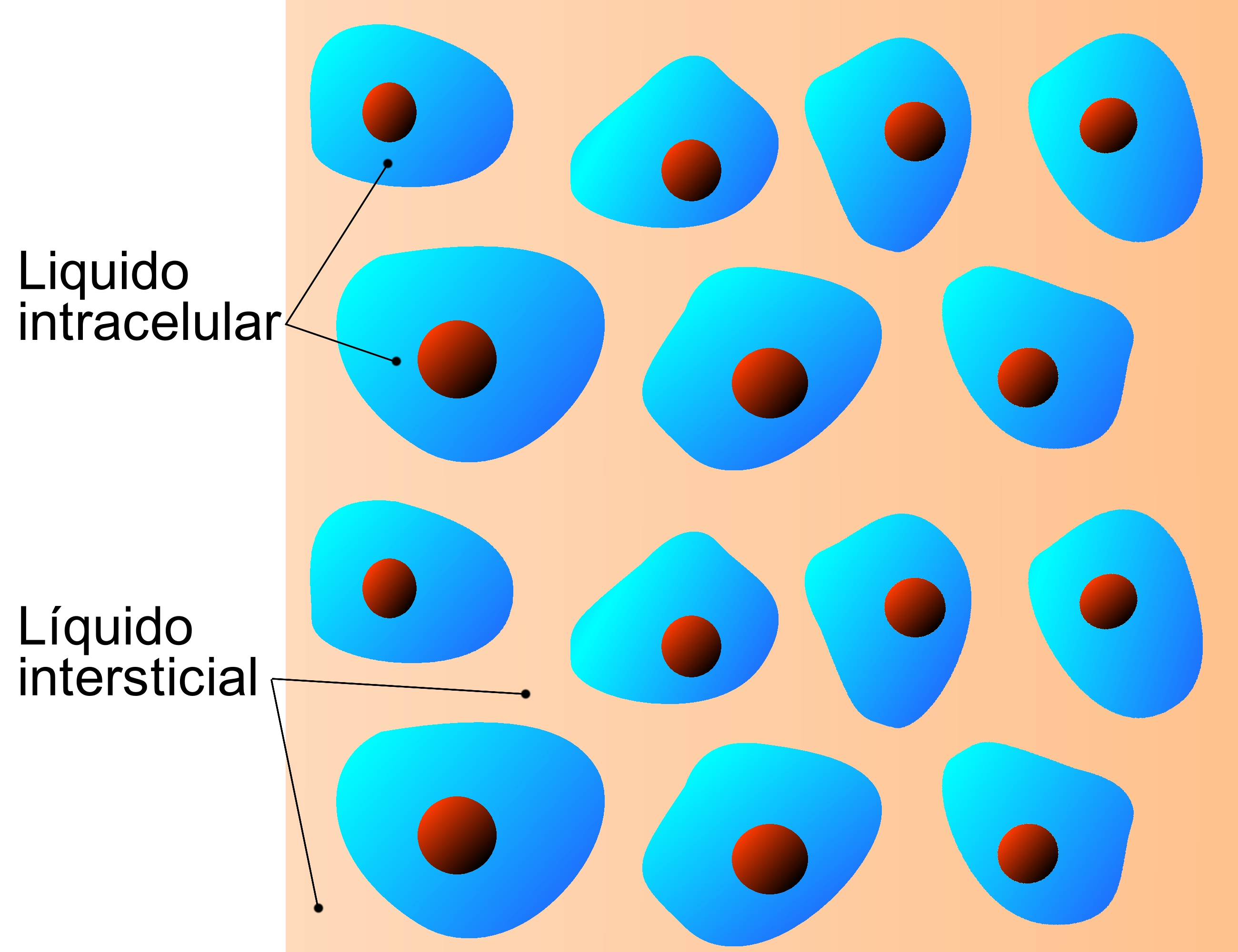 Esquema en el que se representa un tejido y se señala la situación del líquido intersticial e intracelular